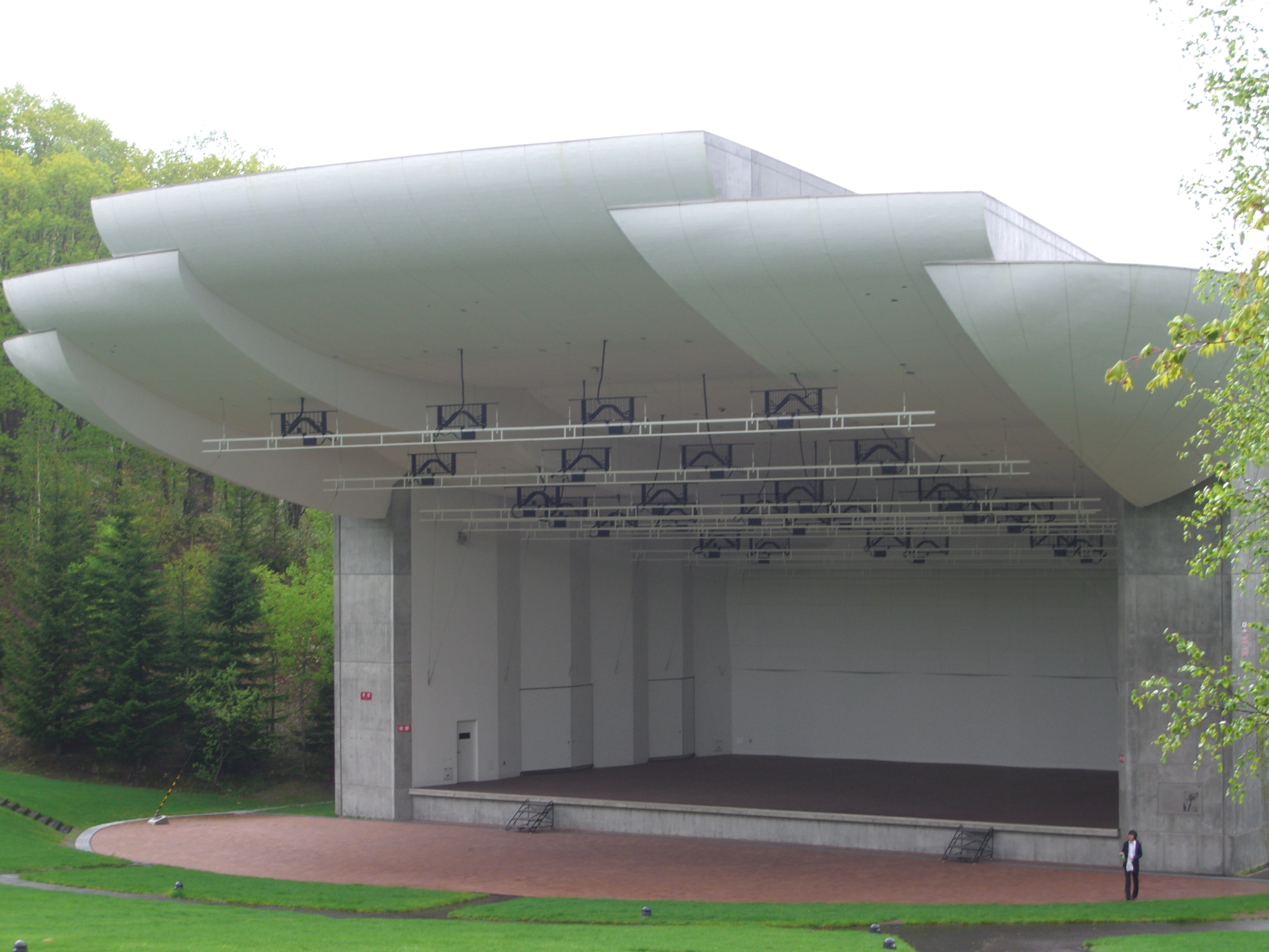 右下にいる人と比べると、このステージがすごく大きいことが分かる。 [1]